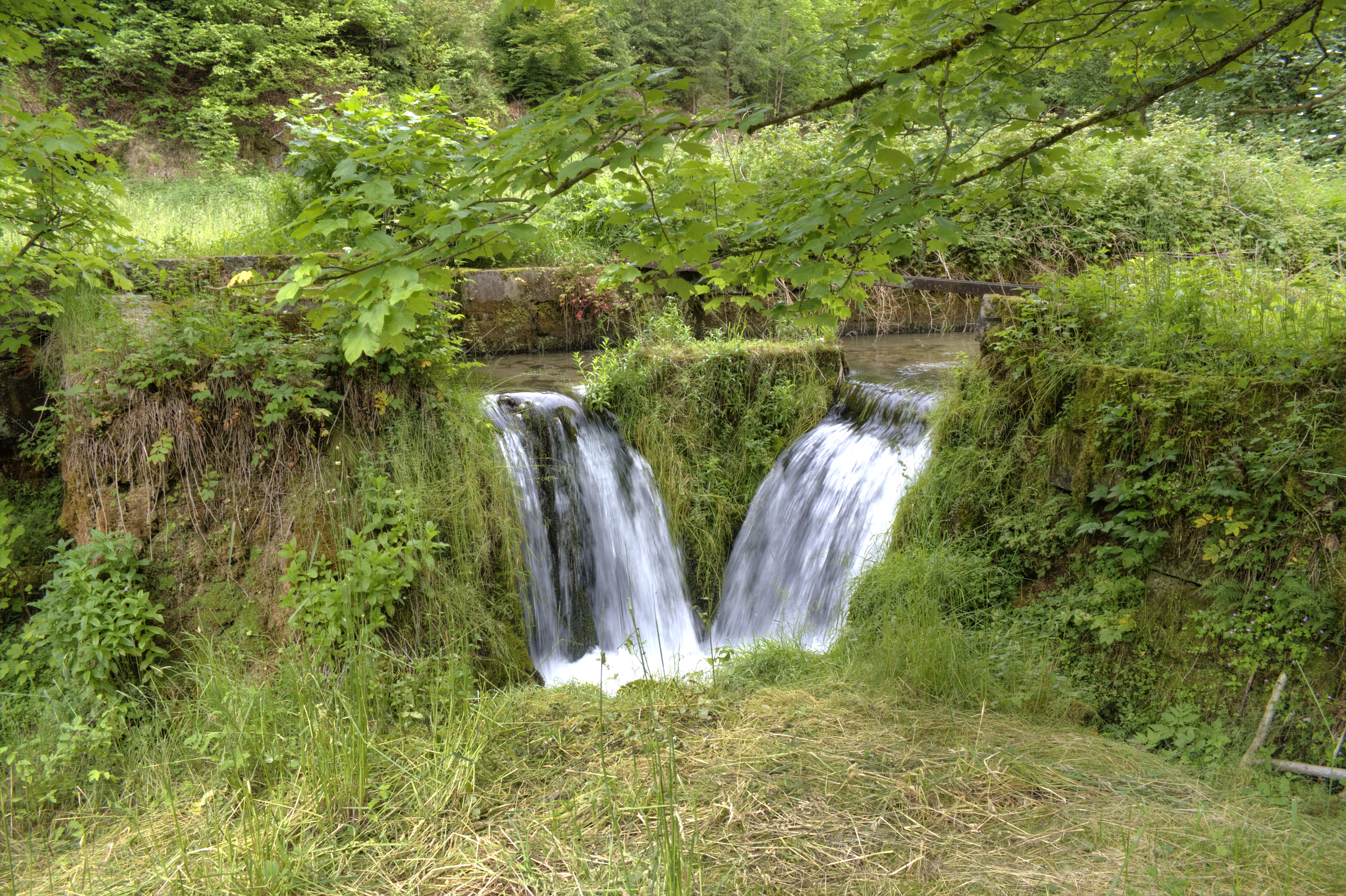 Rest der Wehranlage der Bienleinsmühle